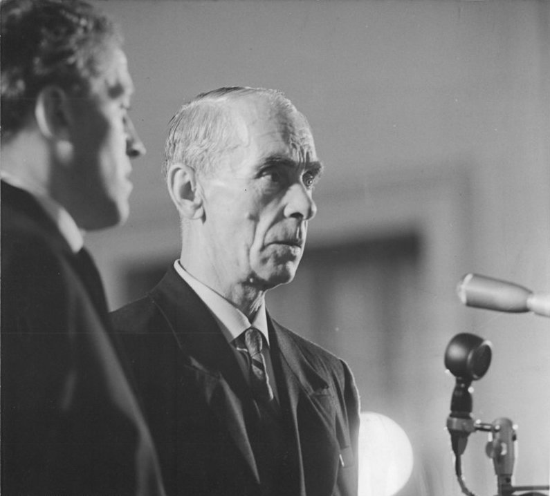 Zentralbild / Stöhr / 13.7.1963 / 6. Prozeßtag vor dem Obersten Gericht der DDR. Am 6. Prozeßtag des 1. Strafsenats des Obersten Gerichts der DDR gegen Globke am 13.7.1963 wurden die Germanisierungsverbrechen der Faschisten in den von ihnen okkupierten Ländern mit der Beweisaufnahme weiter verhandelt. Insbesondere wurden die Praktiken Globkes und seiner Komplizen in Polen erörtert, ausserdem kamen erstmals sowjetische Zeugen zu Wort. UBz: Grosses Aufsehen bei den Prozeßbeobachtern und Gästen erregte das Auftreten von zwei sowjetischen Zeugen, die als Hauptbeteiligte an den damaligen Verhandlungen authentische Einzelheiten über die widerrechtliche Angliederung des Memelgebiets im März 1939 durch Nazideutschland und über den maßgeblichen Anteil des Angeklagten Globke an den faschistischen Germanisierungsverbrechen in diesem Gebiet aussagten. Es handelte sich um den damaligen Aussenminister der litauischen Regierung, Juozas Urbschys, und den damaligen Rechtsberater im litauischen Innenministerium, Antanaz Jokobas, der die Verhandlungen mit Globke über den Vertrag zur Regelung der Staatsangehörigkeitsfragen im okkupierten Memelgebiert führte, A. Jakobas (rechts) bei der Aussage. Links: der Dolmetscher.